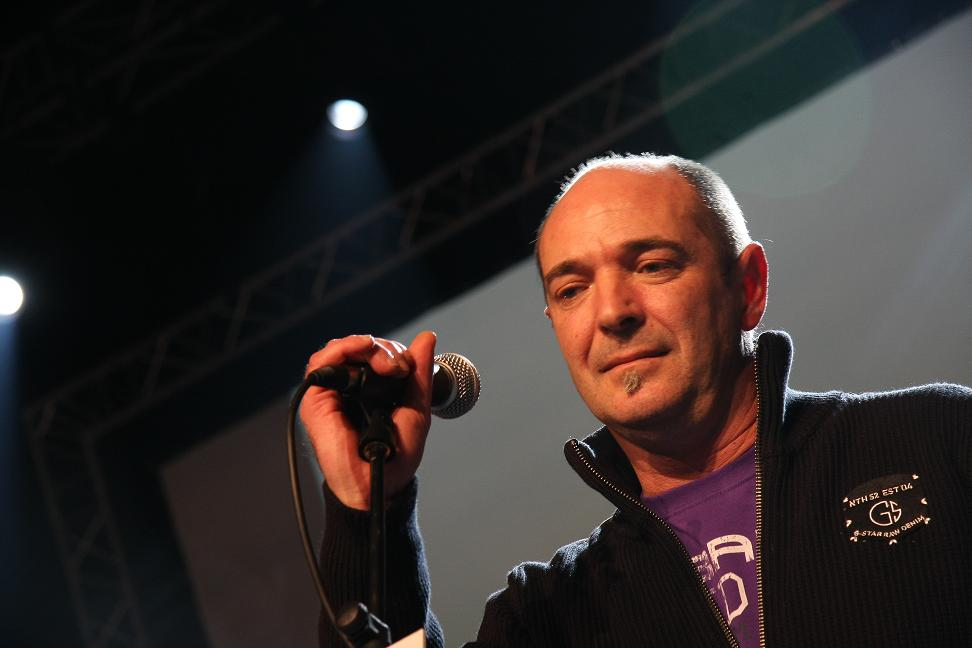 Andoni Egaña, bertsolaria, 2009ko Bertsolari Txapelketa Nagusian.